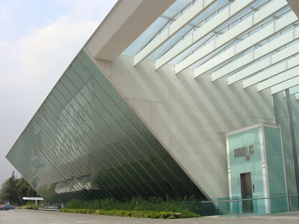 El edificio del MUAC,obra del reconocido arquitecto mexicano Teodoro González de León.